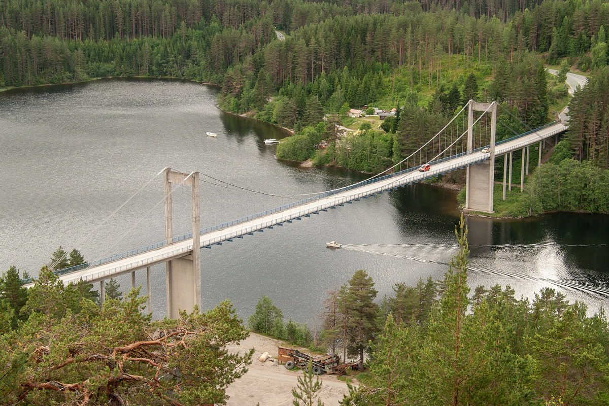 Spjotsodd bru sett fra Savåsen.